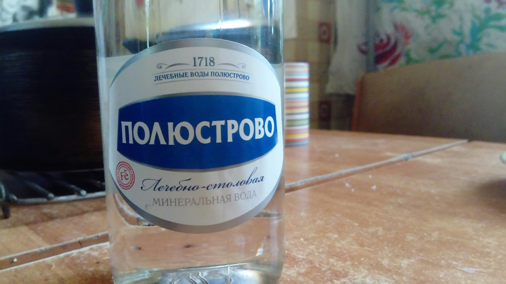 Полюстрово - марка железистой воды из одноименного района Санкт-Петербурга. Куплено в магазине Перекресток на Ярослава Гашека во Фрунзенском районе. Снято на кухне